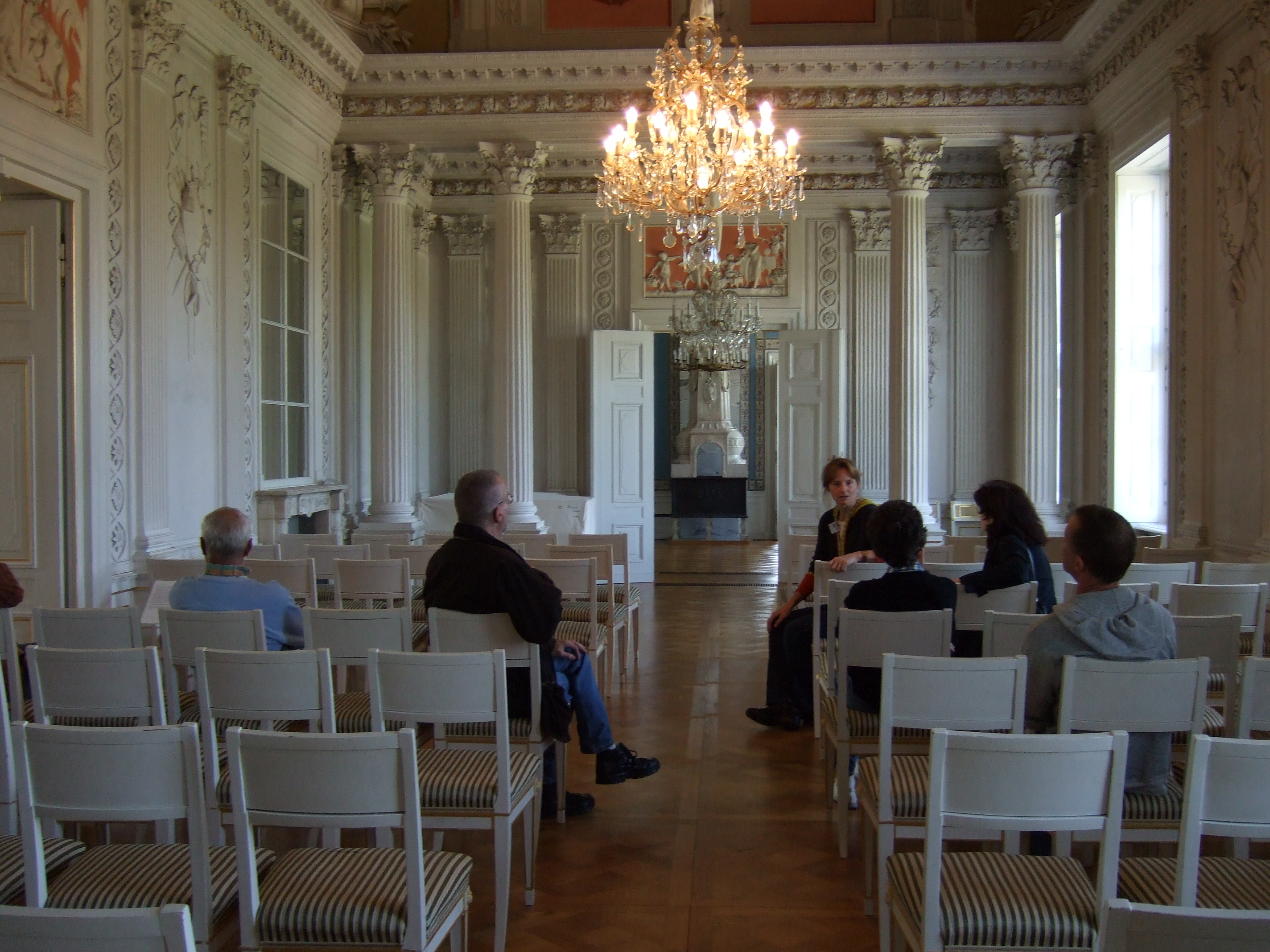 Säulensaal